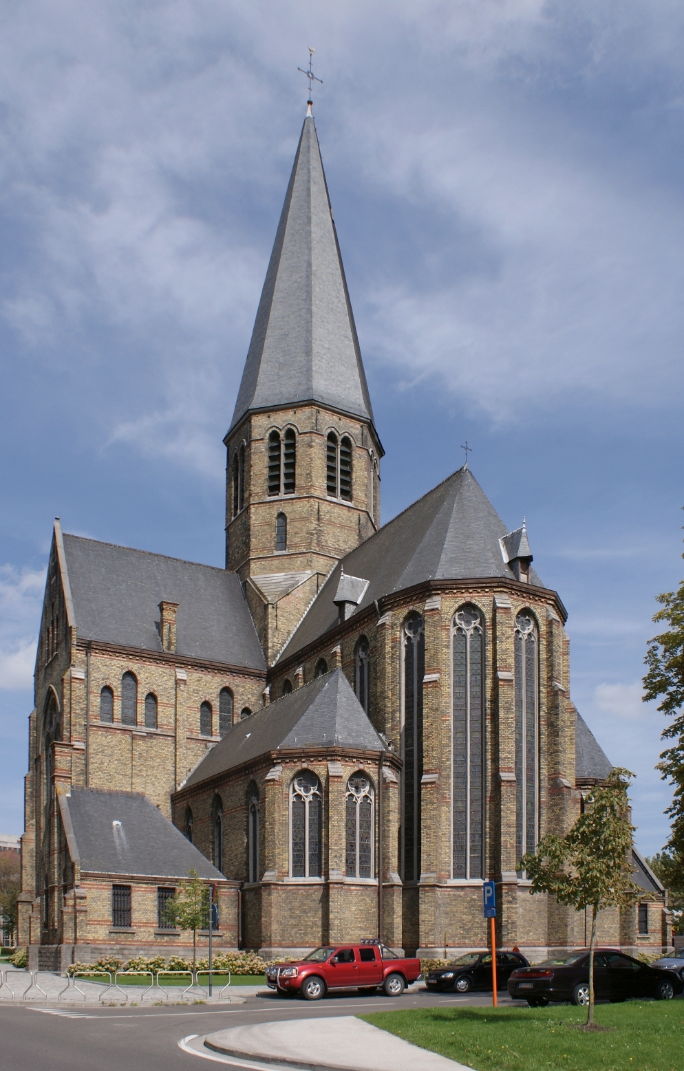 Onze-Lieve-Vrouw van Bijstandkerk te Aalst - Buitenzicht aan de zijde van het koor